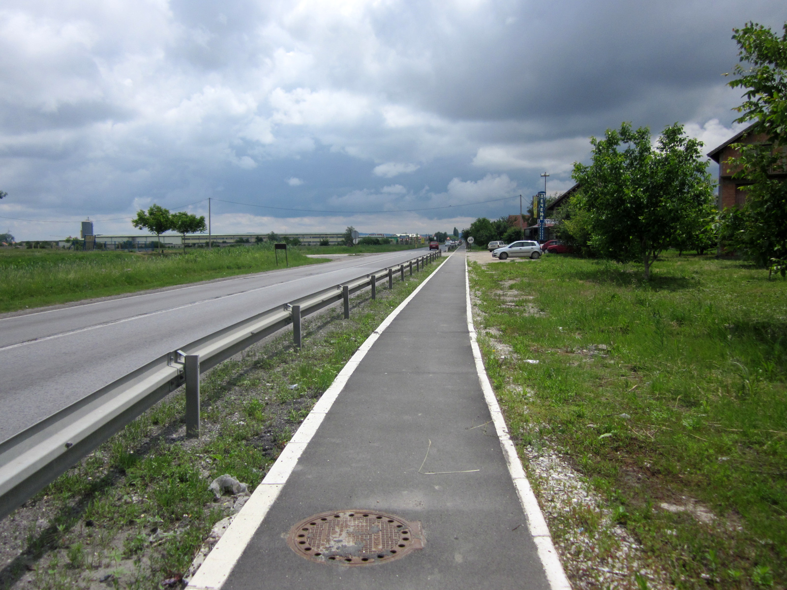 Zrenjanin - Belgrade road (Зрењанински пут), 12 km from downtown Belgrade